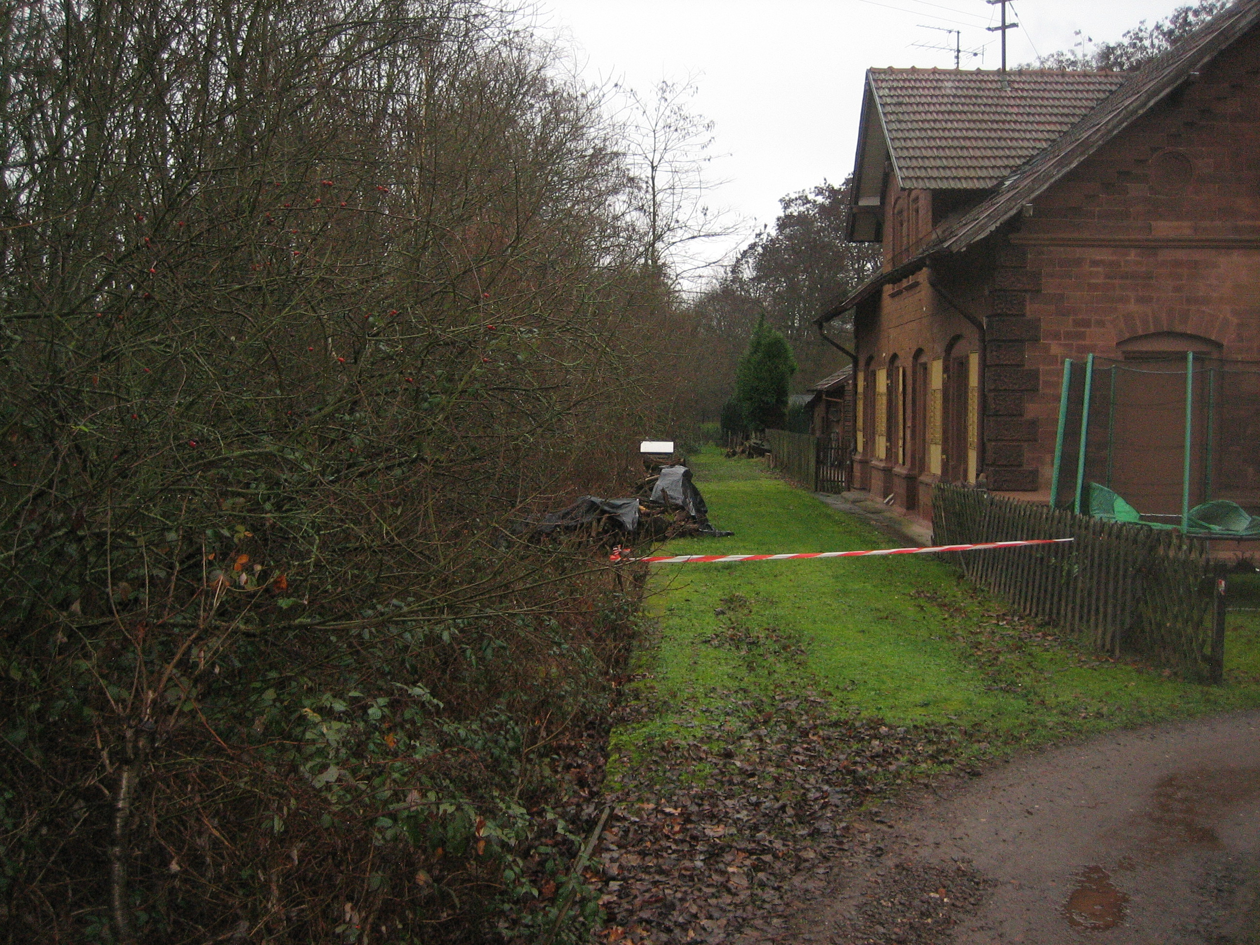 Gleisseite des früheren Bahnhof Tiefenthal